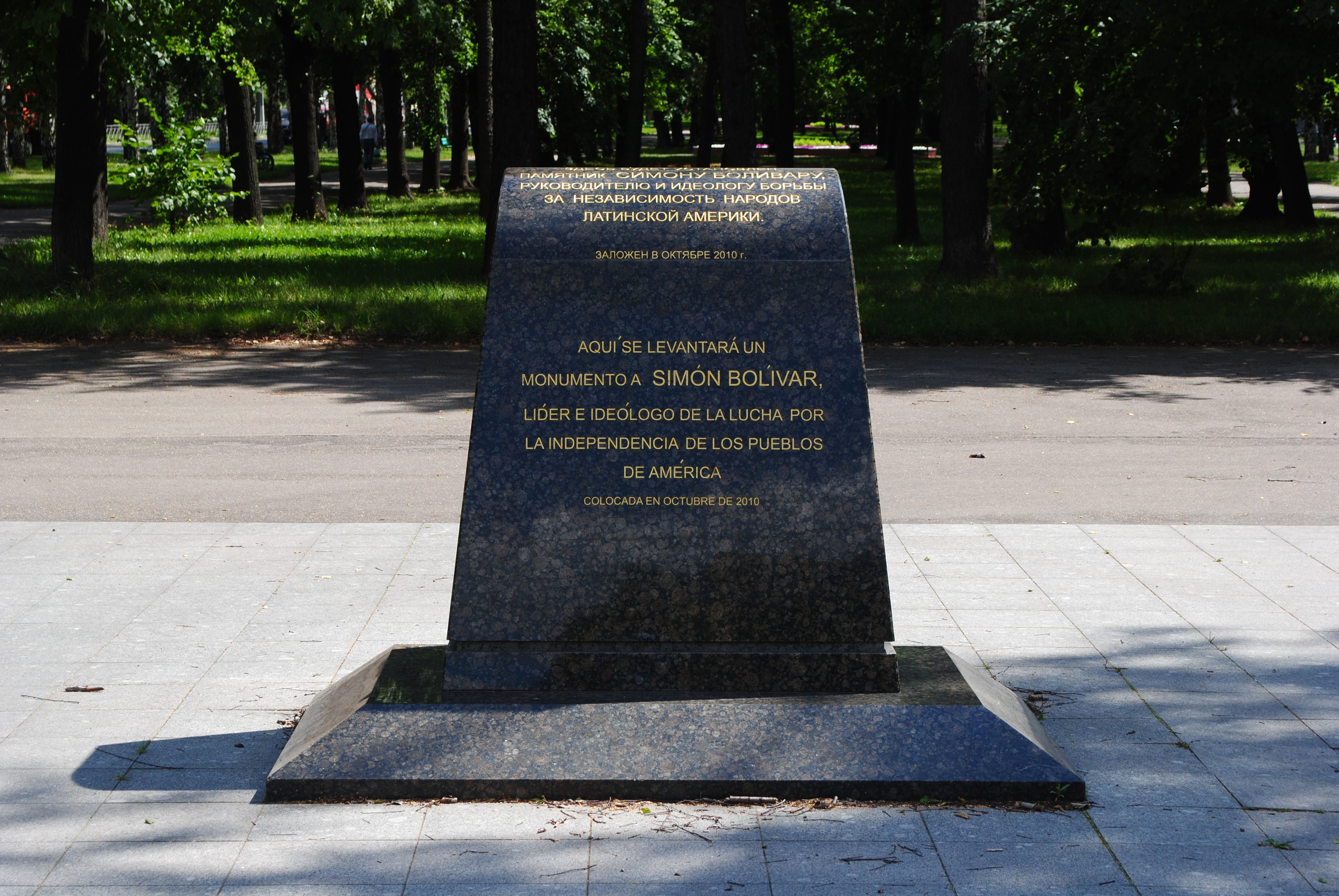 Закладной камень памятника национальному герою Венесуэлы Симону Боливару на Университетском проспекте у пересечения с проспектом Вернадского